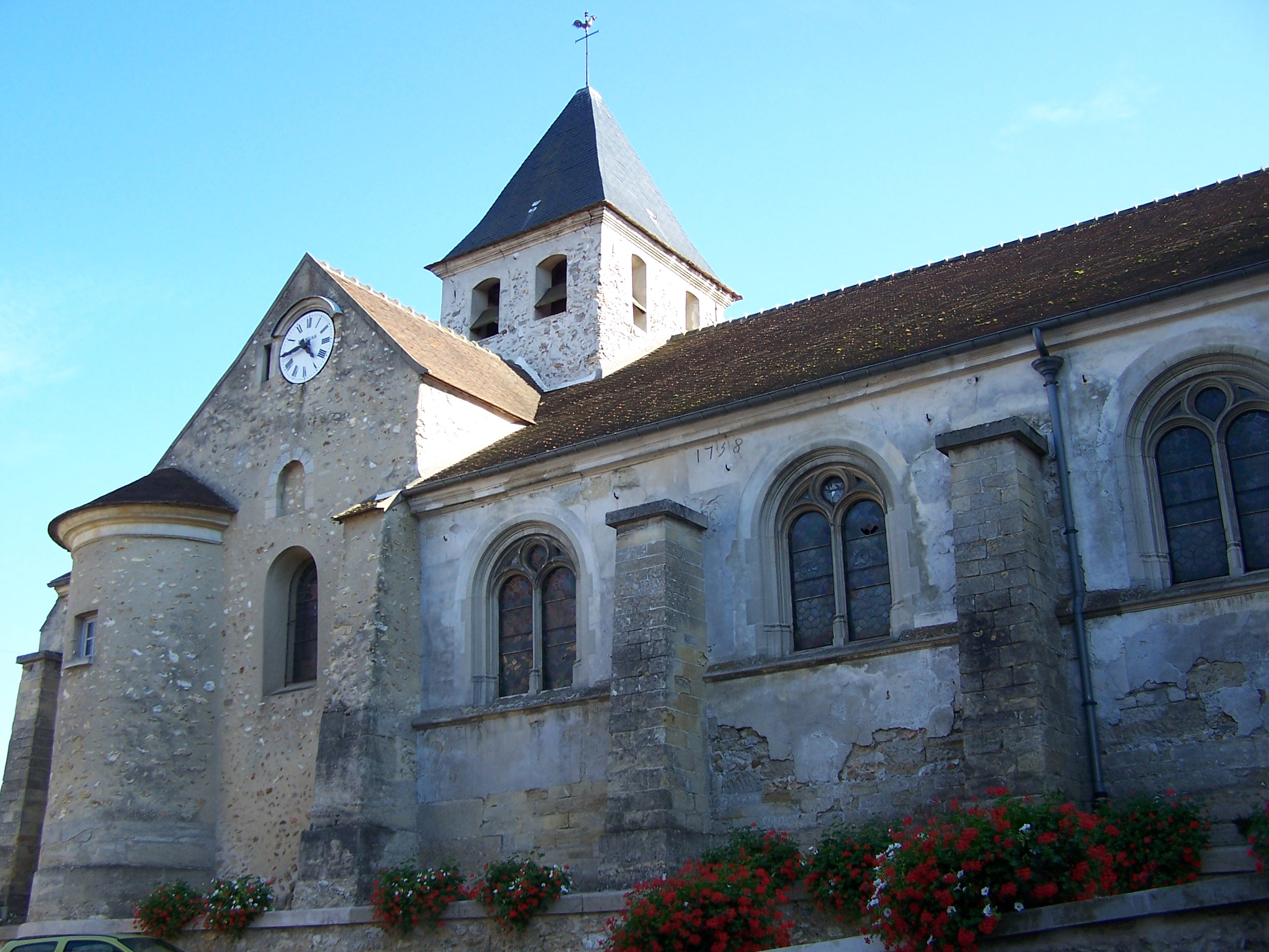 Église d'Évecquemont (Yvelines, France)